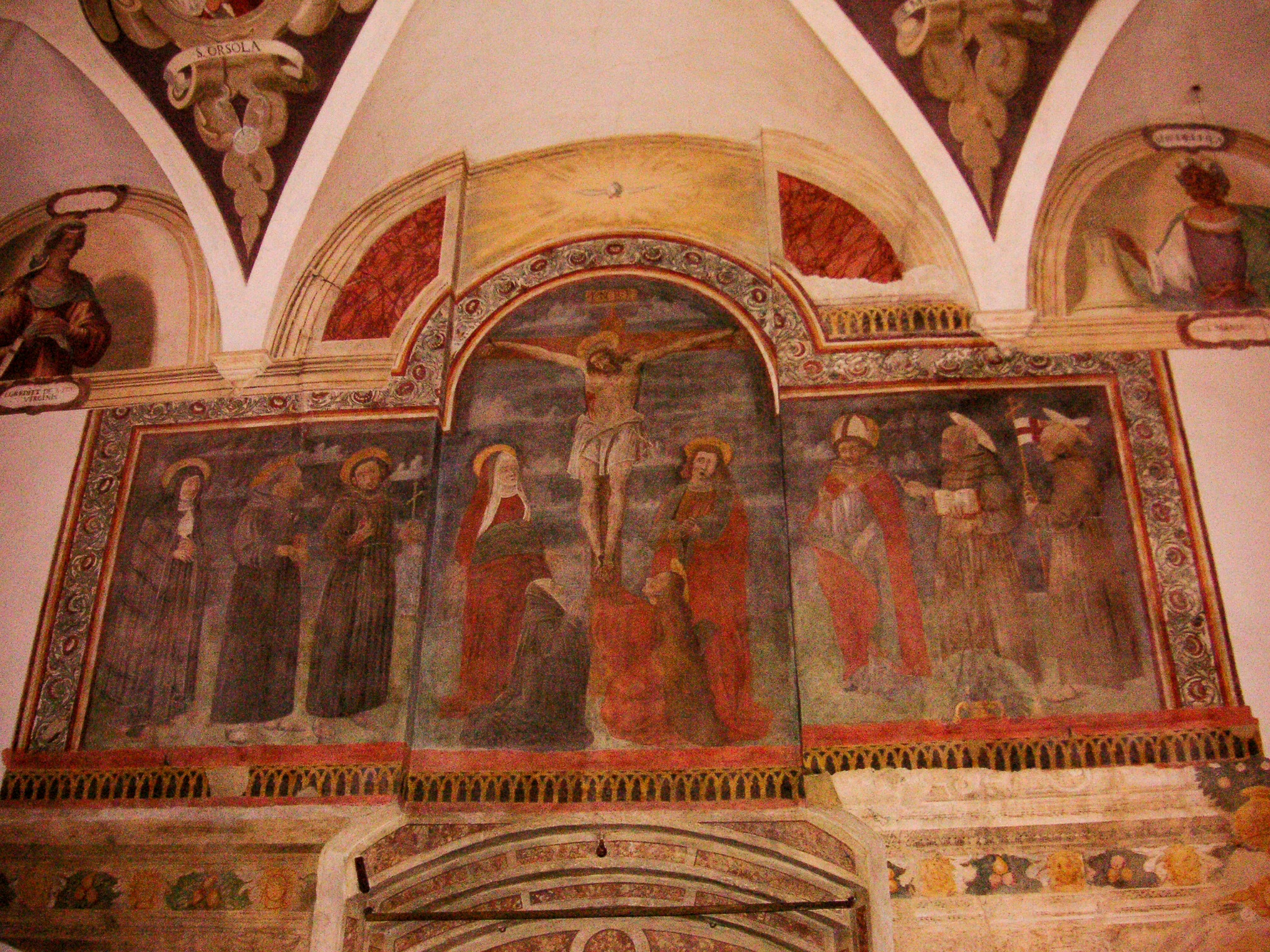 Chiesa di Santa Chiara in Vicenza - Coro delle monache - Crocefissione di scuola squarcionesca